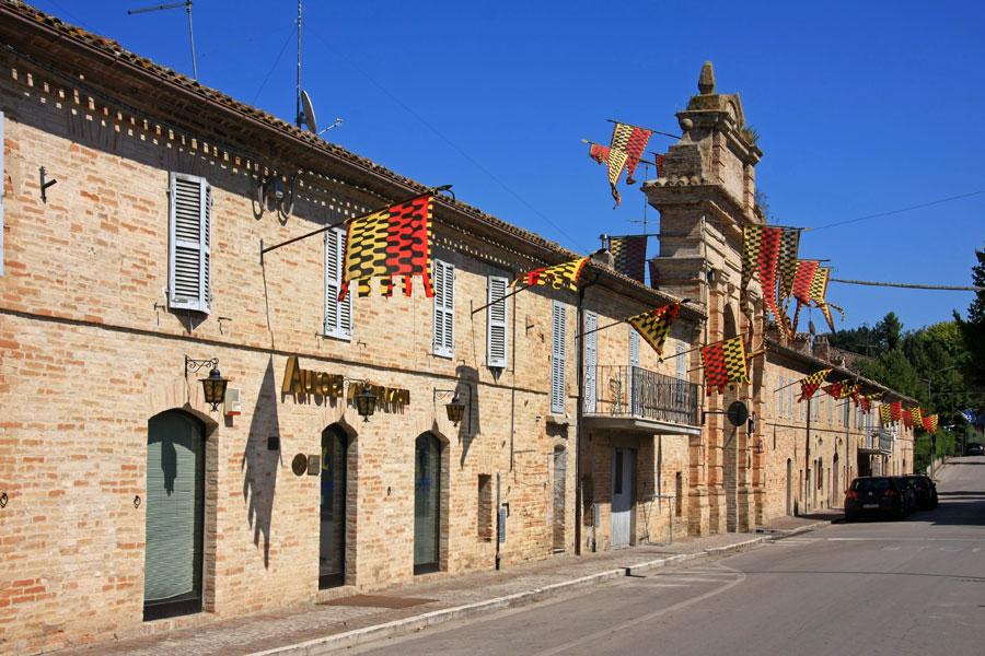 Scorcio del perimetro esterno del centro storico di Servigliano (FM), costituito da un quadrilatero perfetto accessibile da 3 porte (nella foto Porta Santo Spirito)